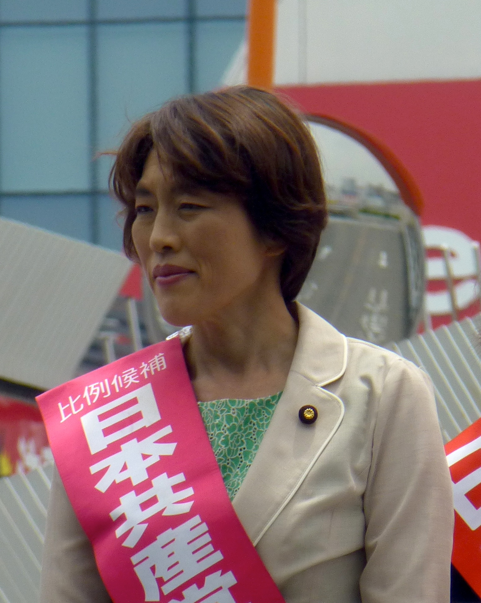 田村 智子（たむら ともこ、Tomoko Tamura、1965年7月4日 - ）は、日本の政治家。日本共産党所属の参議院議員（1期）。